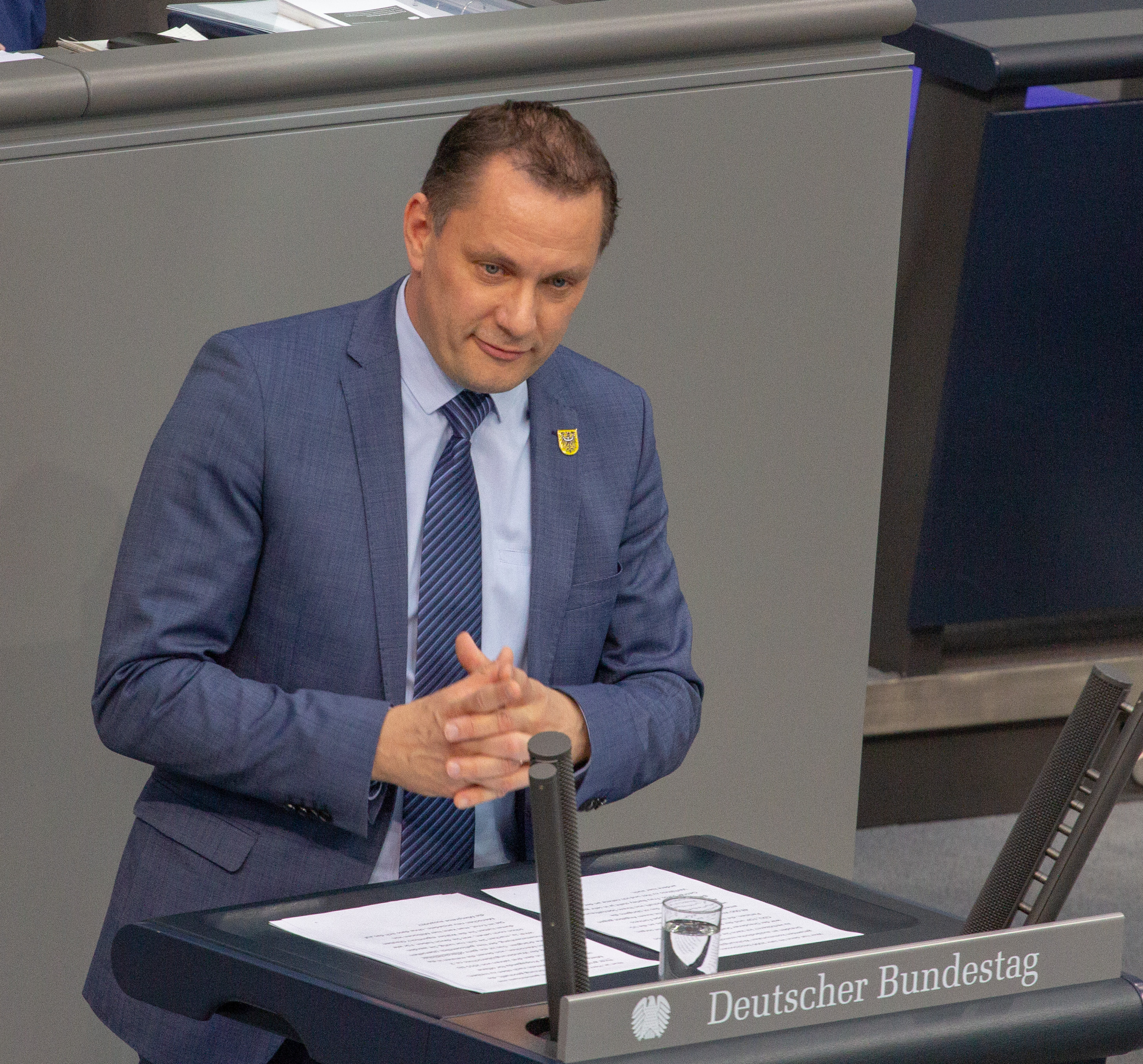 Tino Chrupalla, Mitglied des Deutschen Bundestages, während einer Plenarsitzung am 10. April 2019 in Berlin.